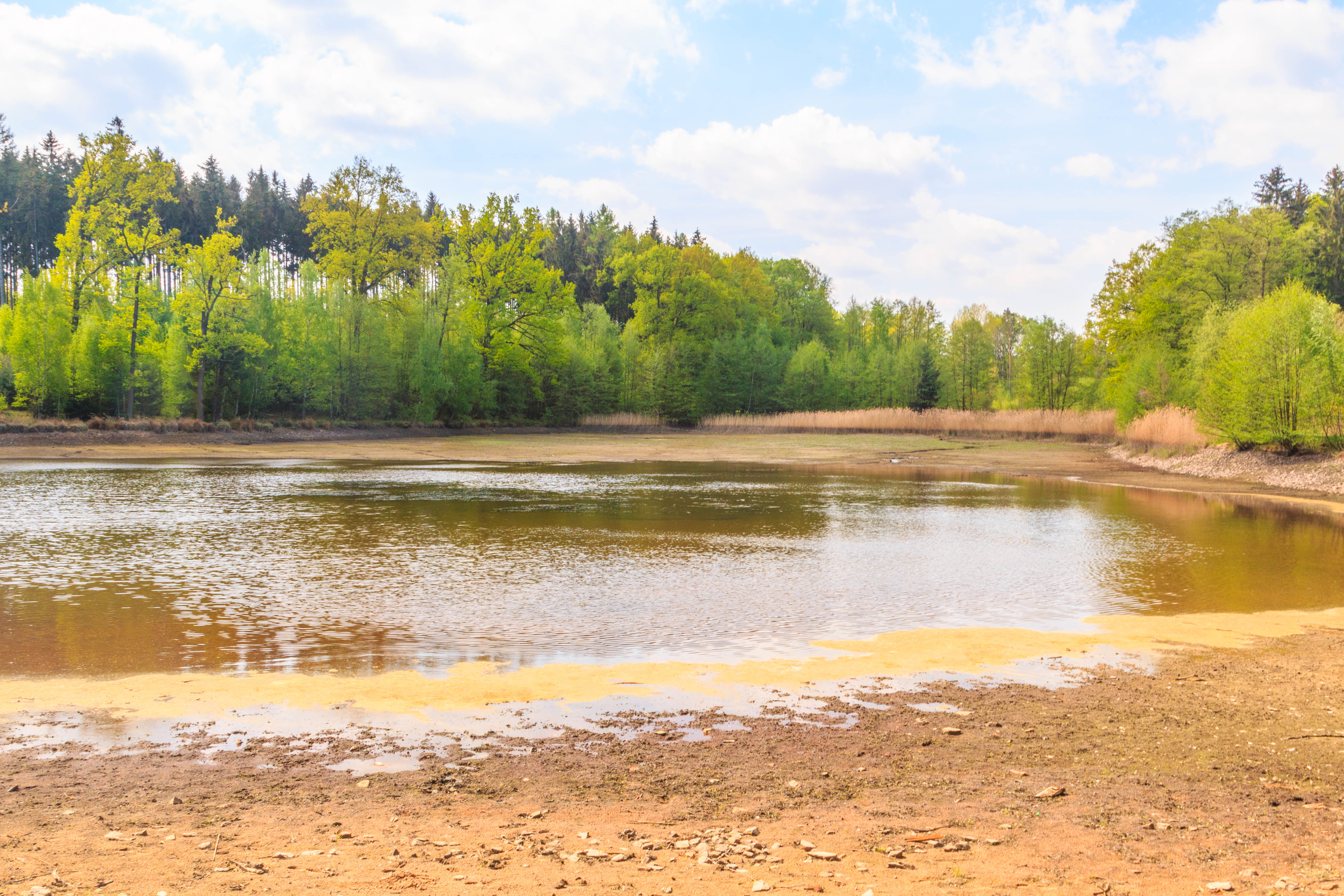 Rybník Strach u osady Rašovy Project: Vodstvo.